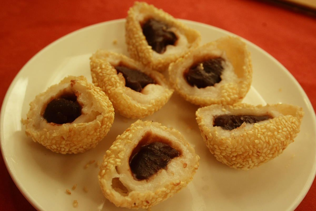 芝麻球